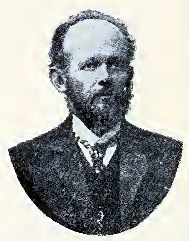 "Carlos Reiche" p. 296